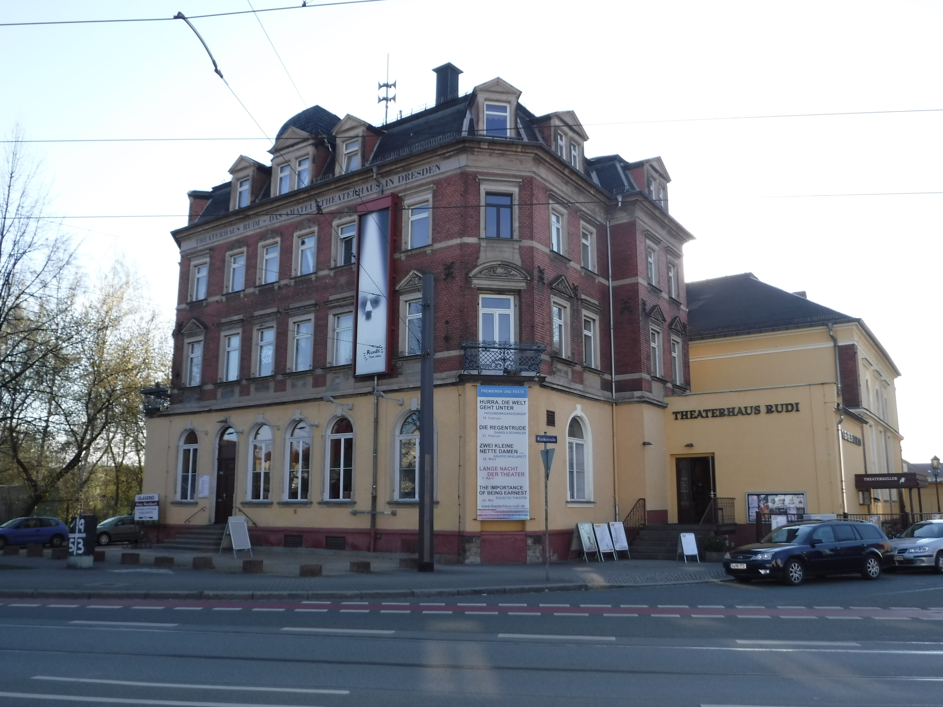 Theaterhaus Rudi (Fechnerstraße 2A, 01139 Dresden) zur Langen Nacht der Dresdner Theater